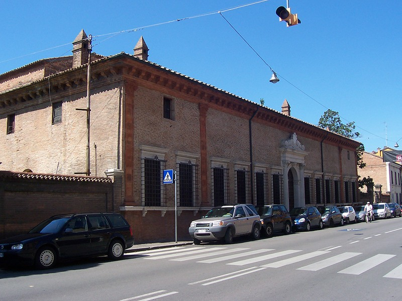 Ferrara - Palazzina di Marfisa d'Este